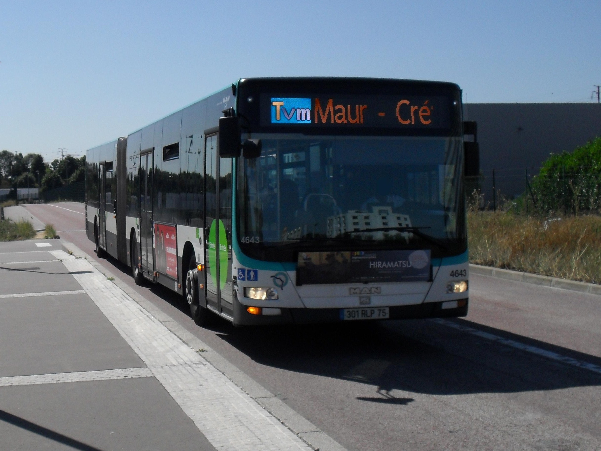 Un bus Lion's City G de la ligne TVM à la station "Le Delta".